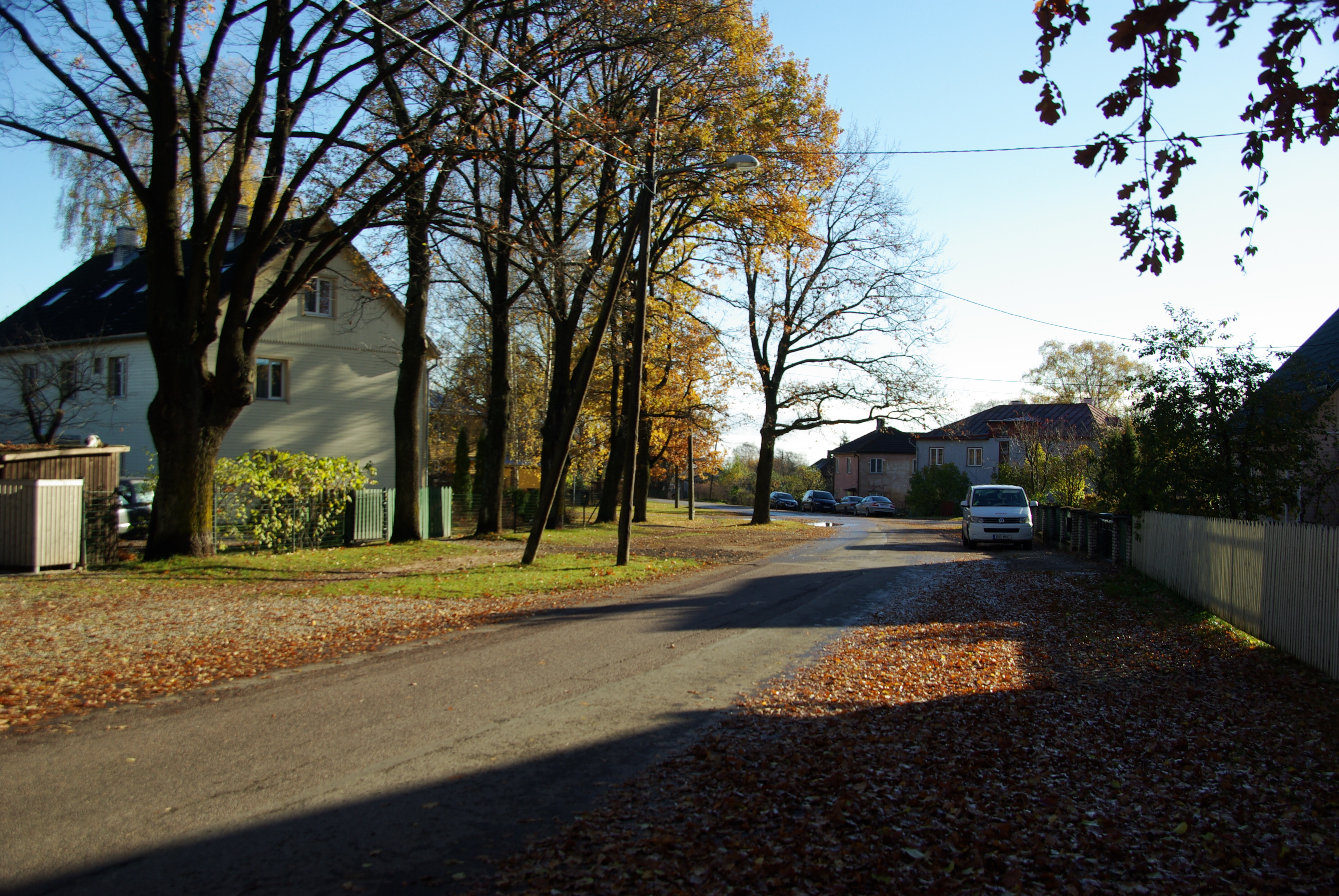 tänav Tartus Tammelinnas